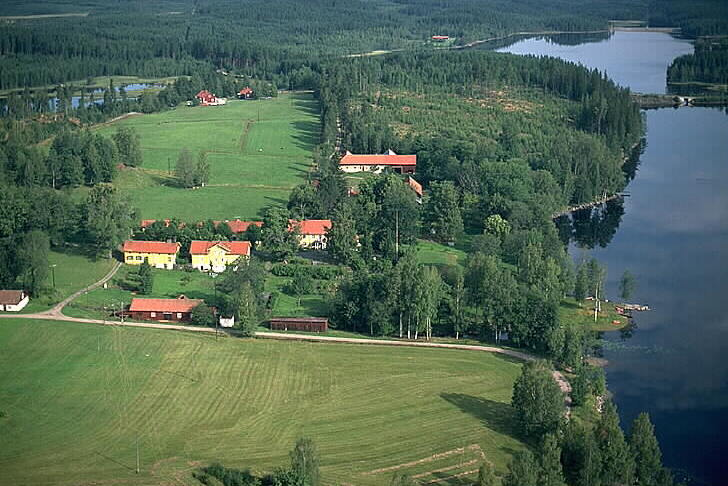 Motiv: Rämmen Nyckelord: Byggnadsminnen, Flygbilder, Riksintressen Kategori: Herrgårds-/slottslandskap Rämmen